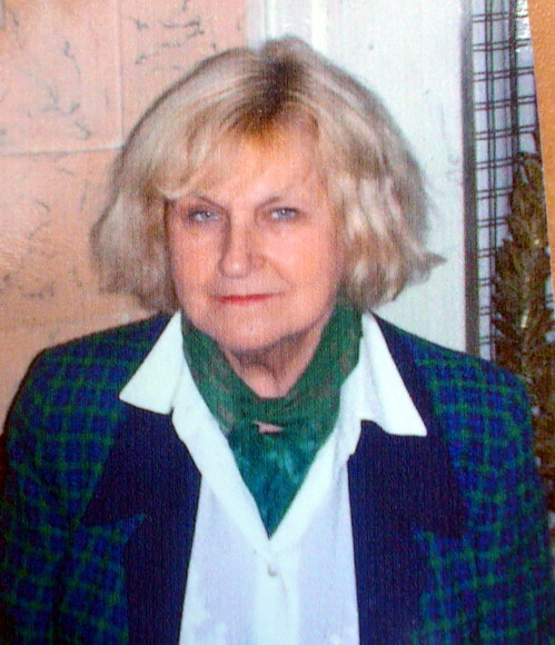 Zofia Mitosek